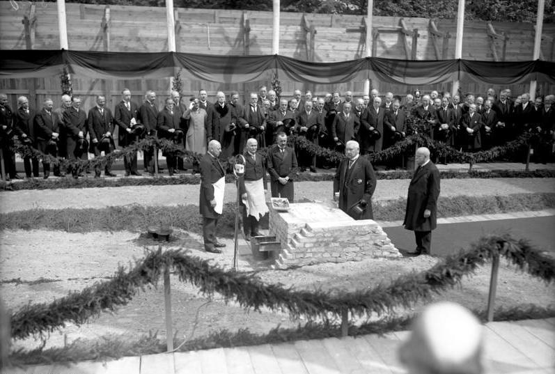 Die feierliche Grundsteinlegung der neuen Reichskanzlei in der Wilhelmstrasse in Berlin! Die feierliche Grundsteinlegung wurde durch den Reichspräsidenten von Hindenburg, Reichskanzler Dr. Marx sowie dem preussischen Ministerpräsidenten Dr. Braun am 18. Mai vollzogen. Reichspräsident von Hindenburg vollzieht die drei Hammerchläge. Hinter ihm stehend Reichskanzler Dr. Marx.